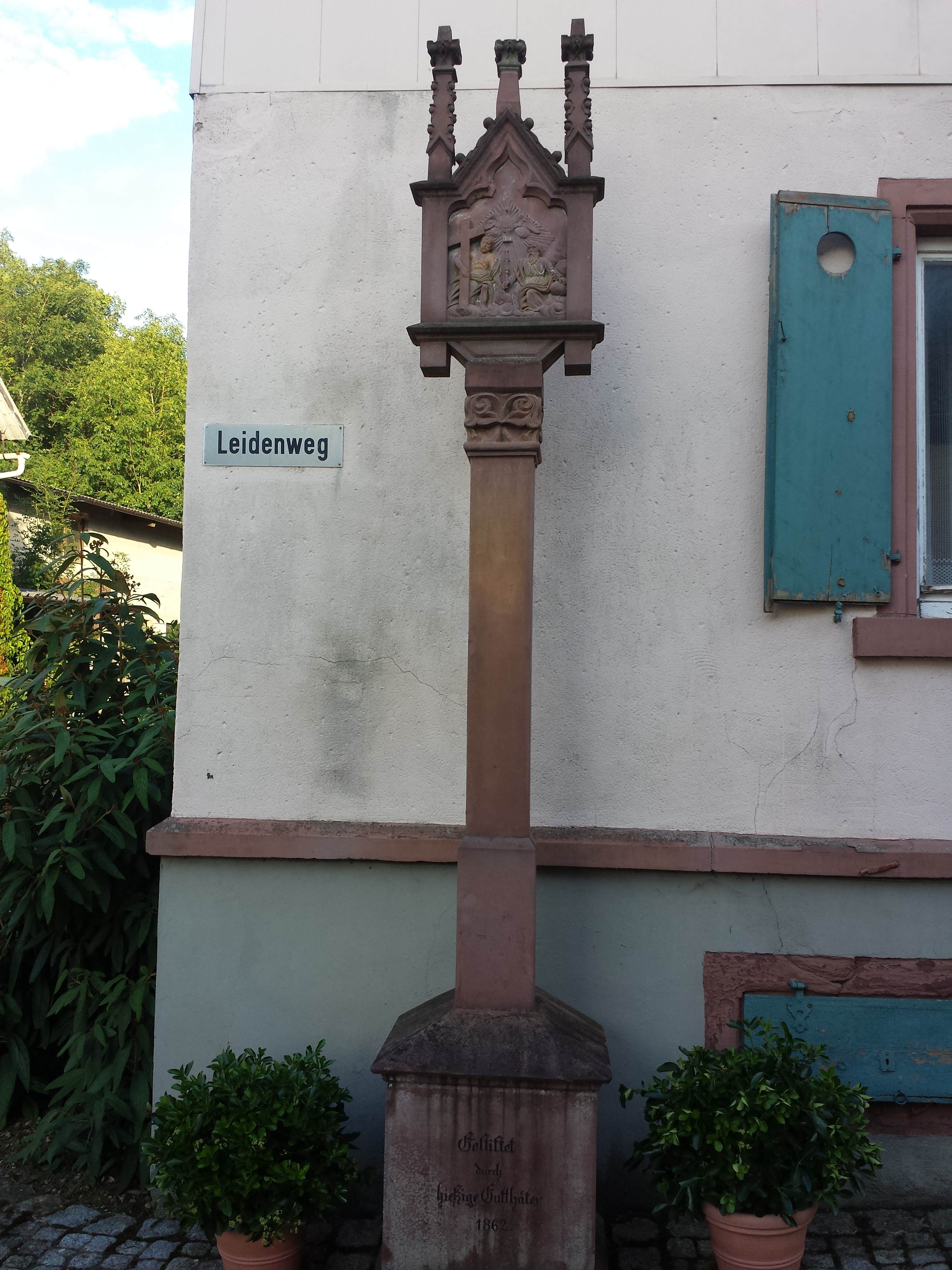 Ein Bildstock am Leidenweg in Werbachhausen.